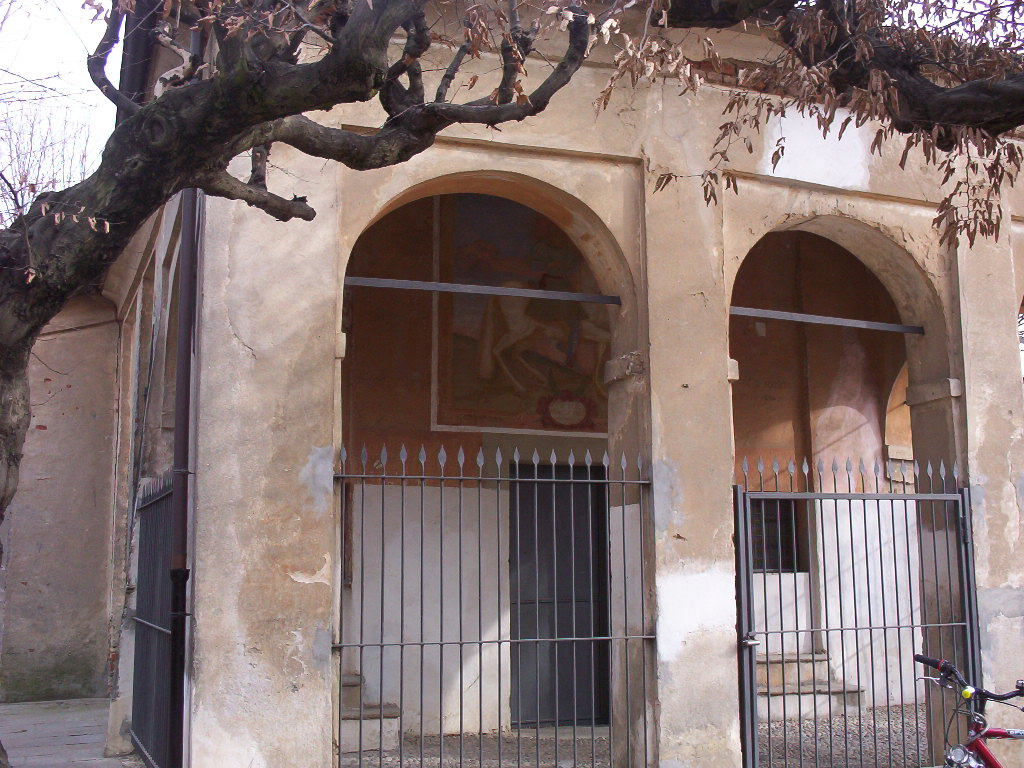 Scorcio della chiesa di San Vittore a Rivalta di Torino